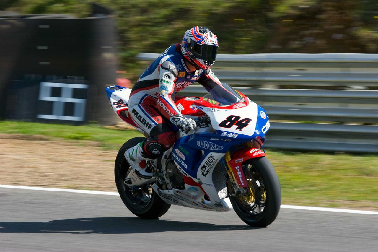 Michael Fabrizio,WSBK Round 10 Brands Hatch 2007